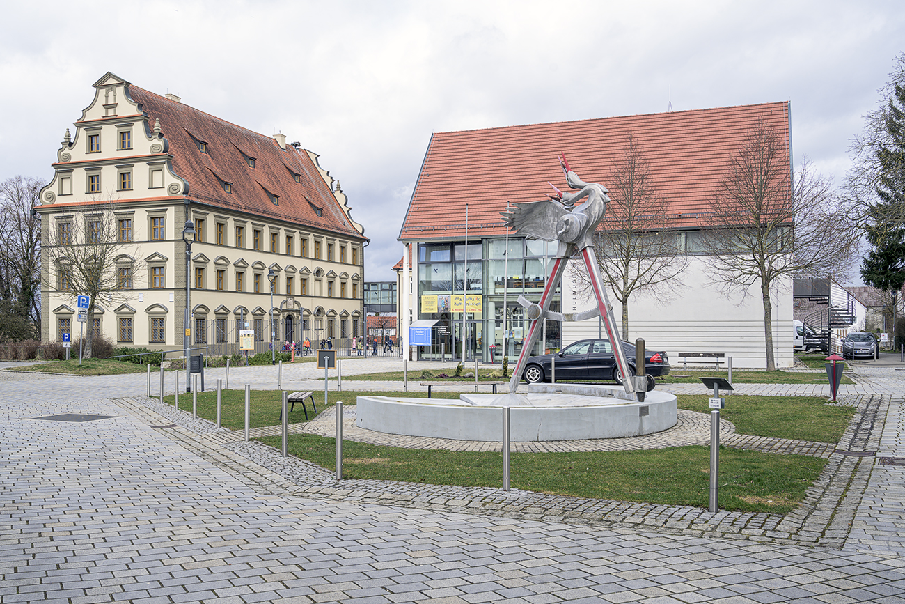 Ichenhausen, Bavaria, School Museum, Department of the Bavarian National Museum